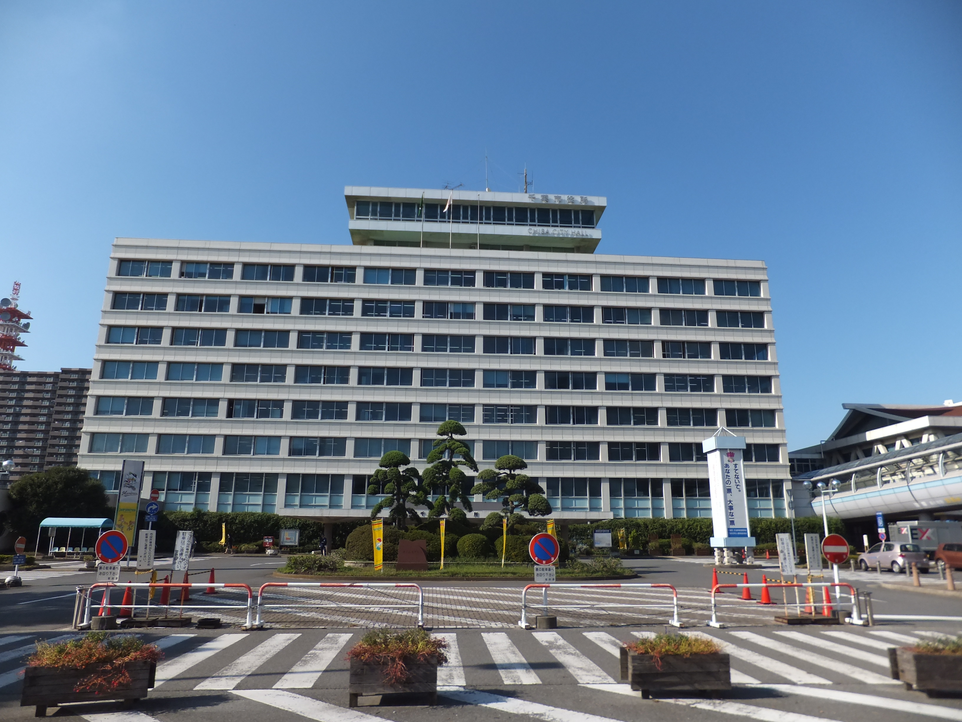 千葉市役所本庁舎（千葉県千葉市中央区）